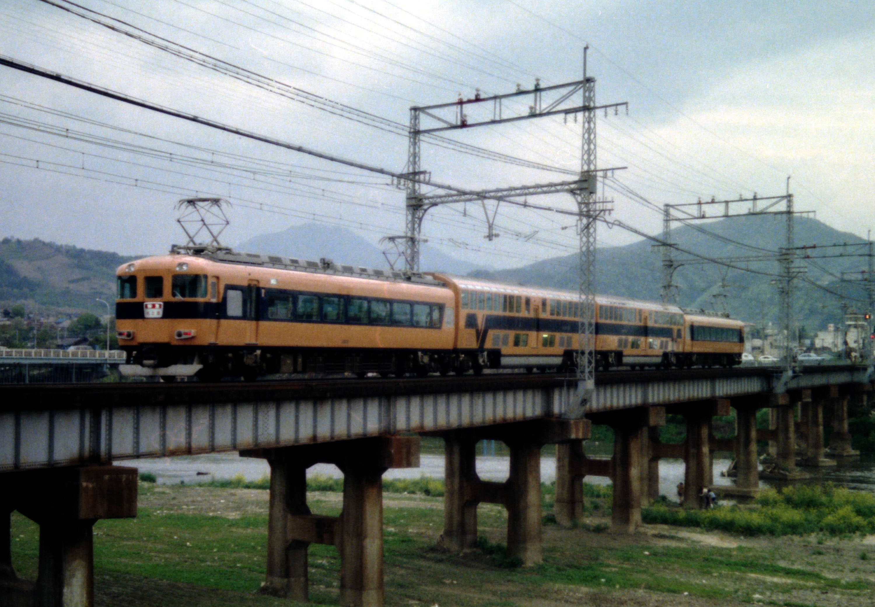 近鉄 ３００００系 旧塗装 Ｓ５５ 河内国分－安堂間